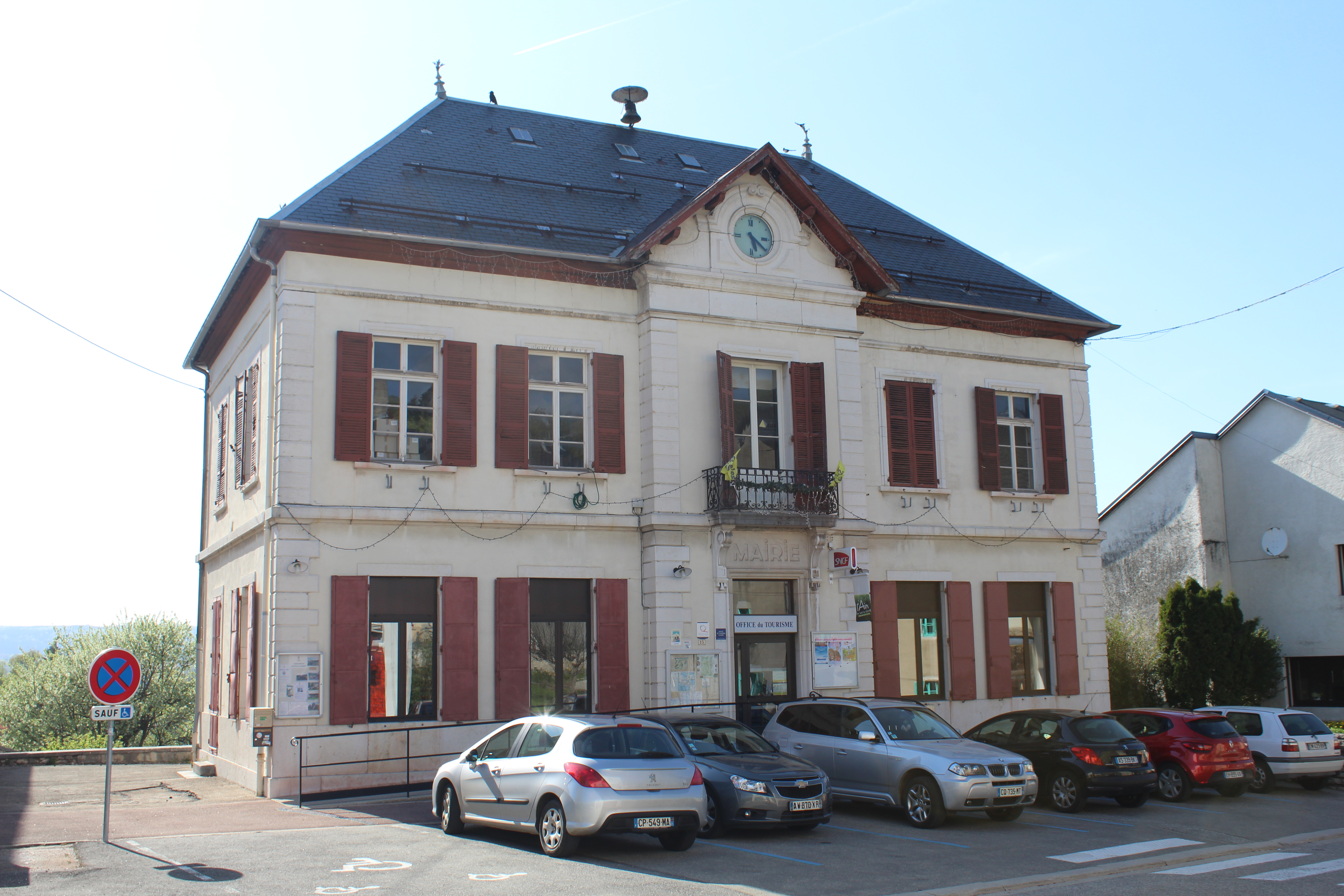 Ancienne mairie de Lompnes, Hauteville-Lompnes.